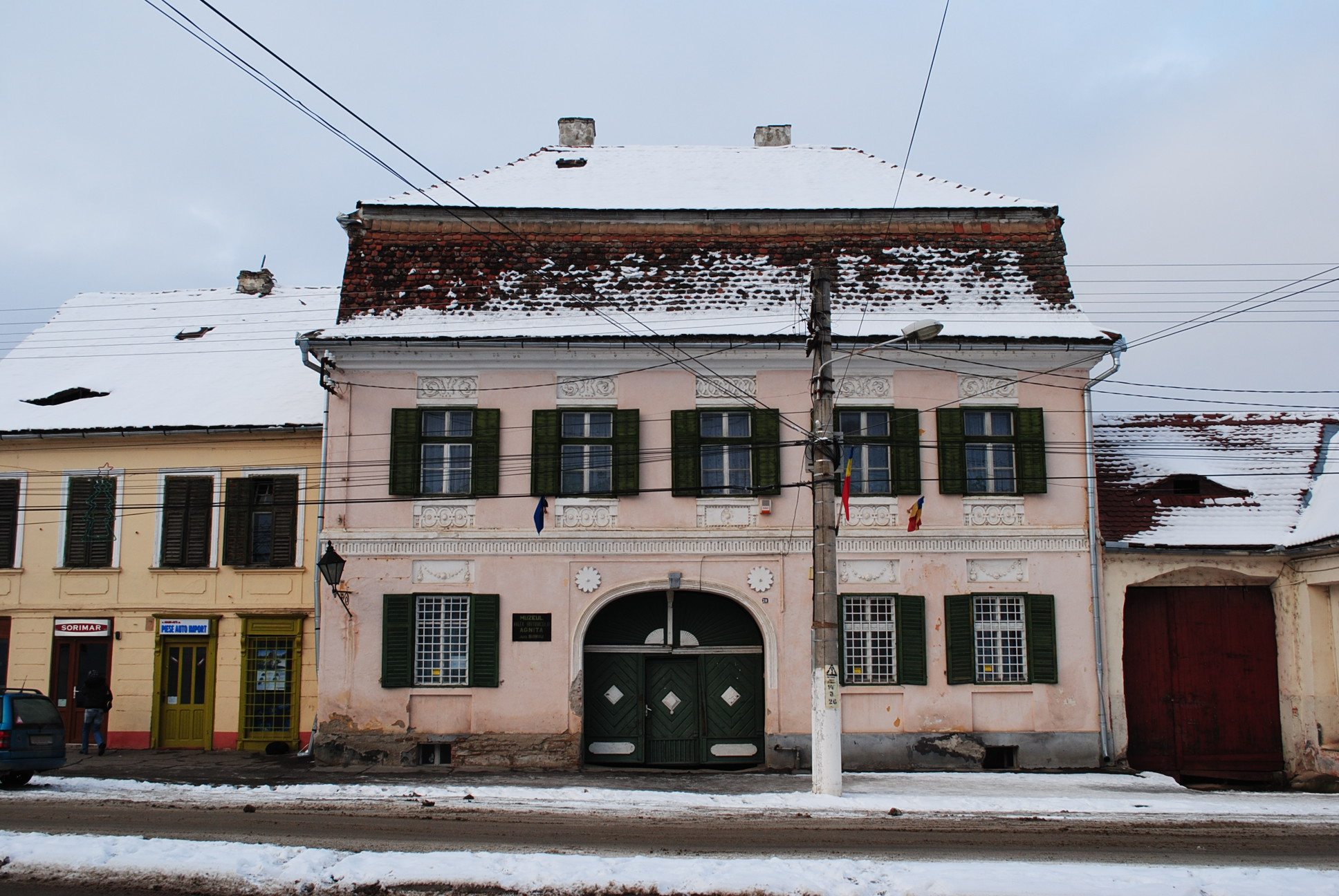 Locuință, azi Muzeul de istorie și etnografie Agnita, 1800